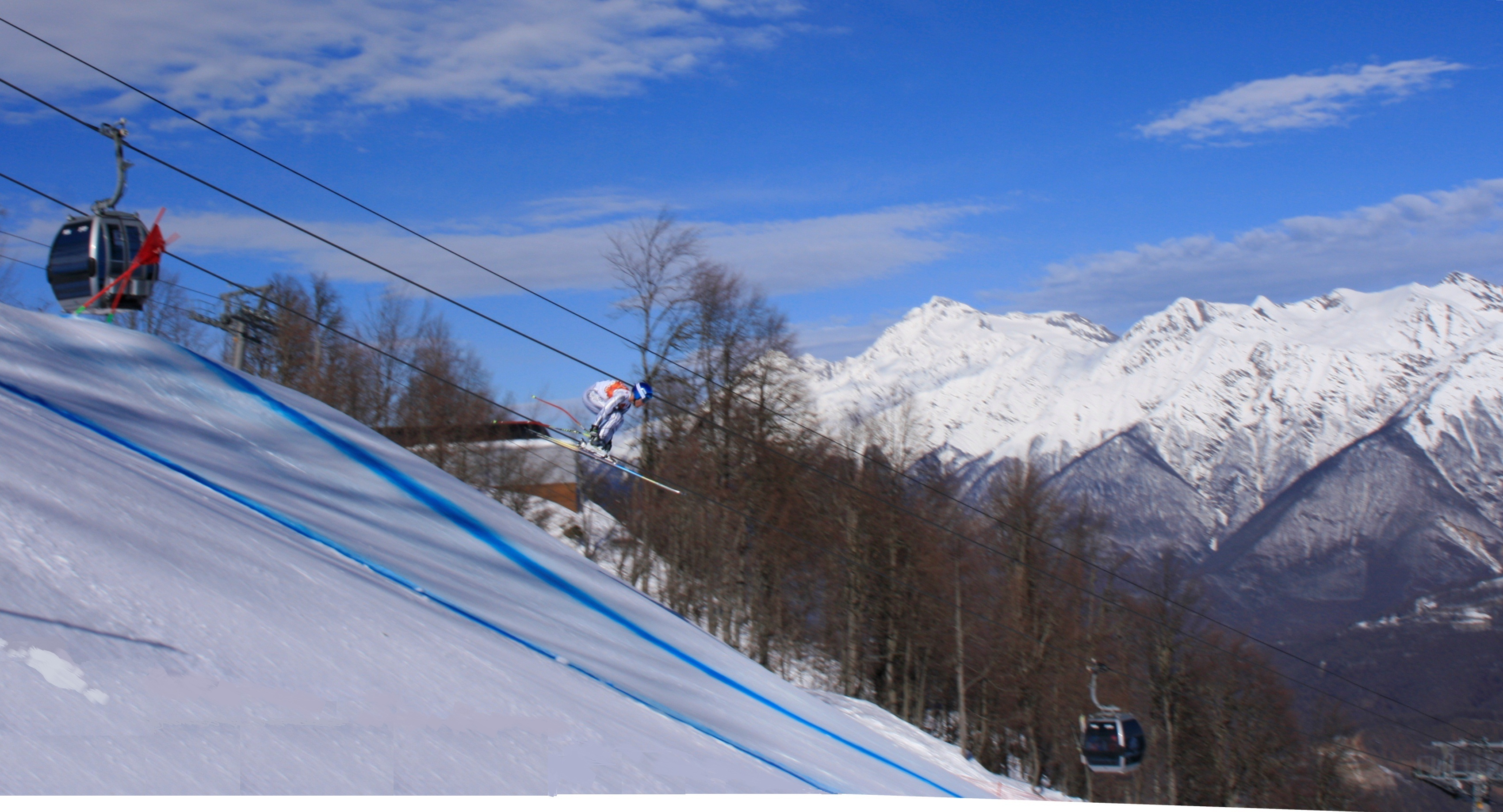 На трассе мужского скоростного спуска на зимних Олимпийских играх 2014 в Сочи. "Русский прыжок".